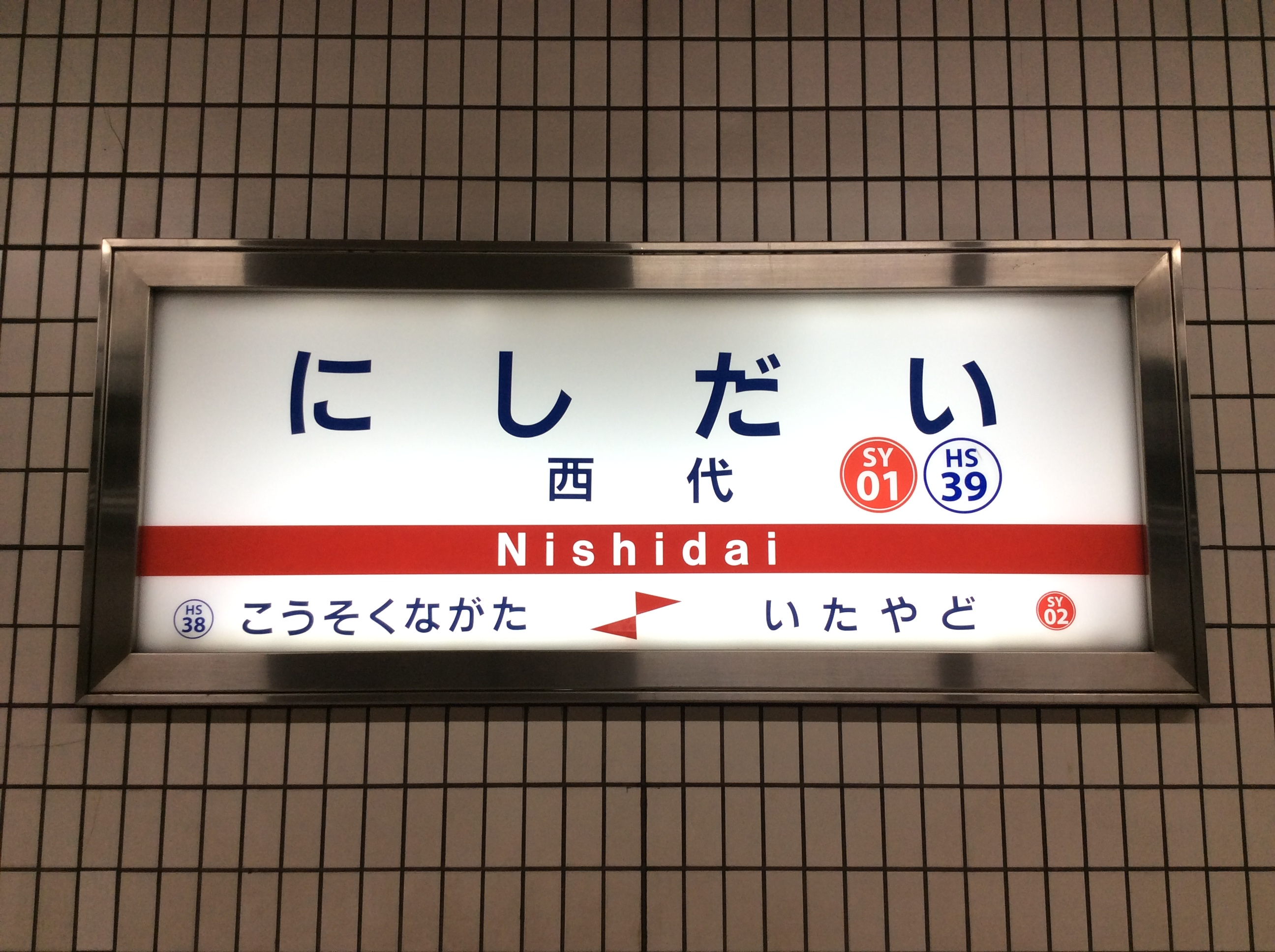 西代駅の駅名標